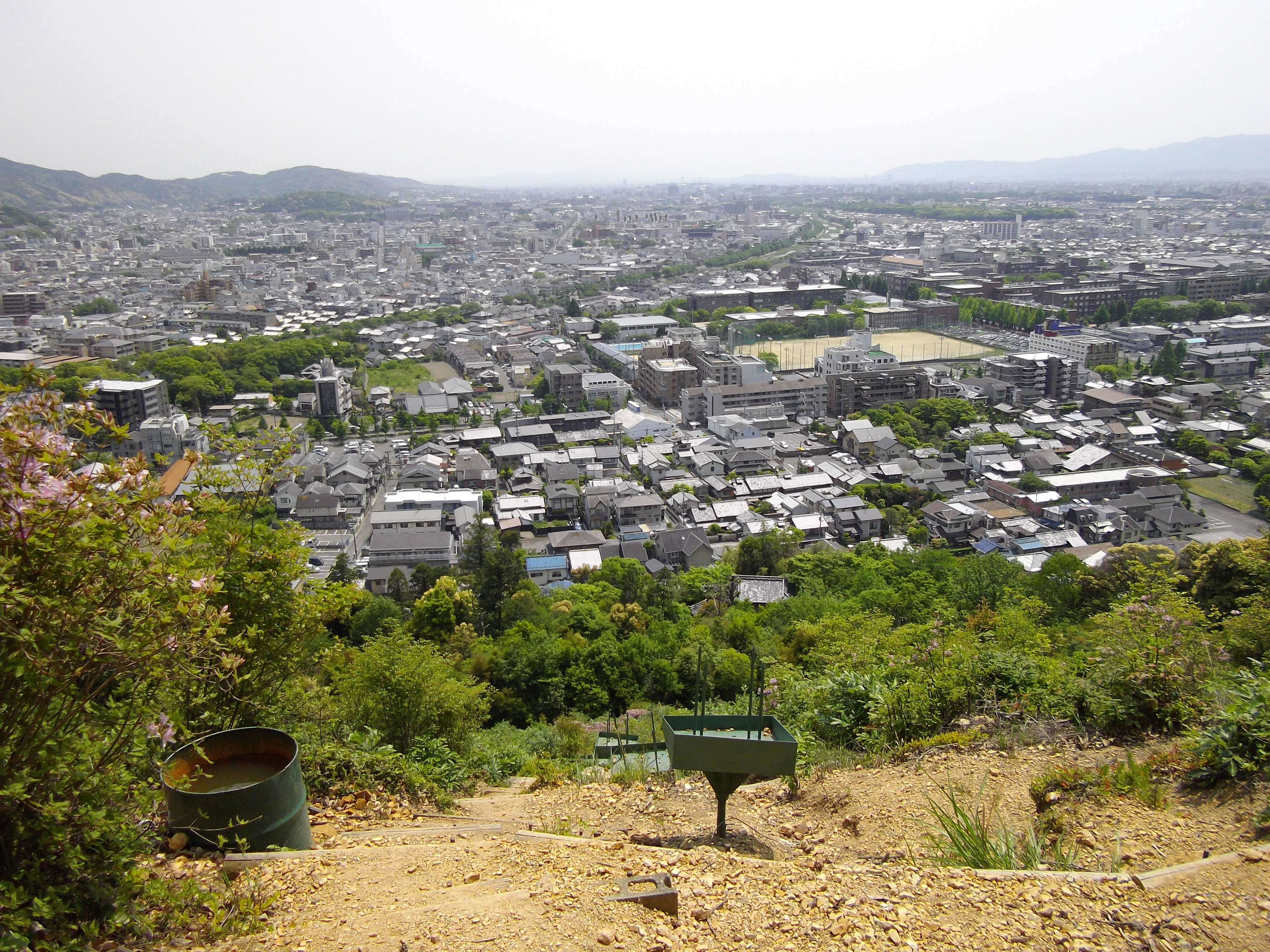 法から南方を望む。